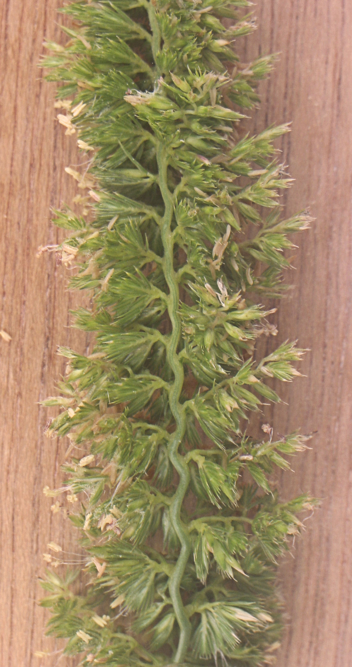 Cynosurus cristatus flowering ear(nl: kamgras bloeiende aar)